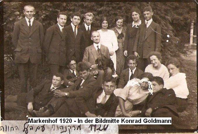 Der Markenhof war ein Hachschara-Lehrgut. Seine Absolventen gründeten in Palästina den Kibbuz Beth Sera (Beit Zera)